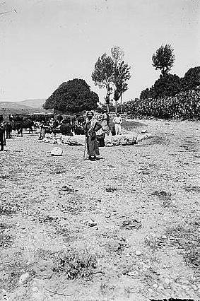 כותר מקורי: Northern views. Joseph's Well at Dothan